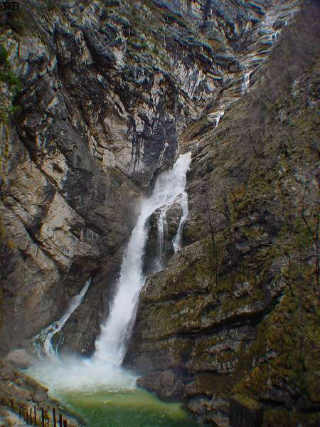 Slap Savica